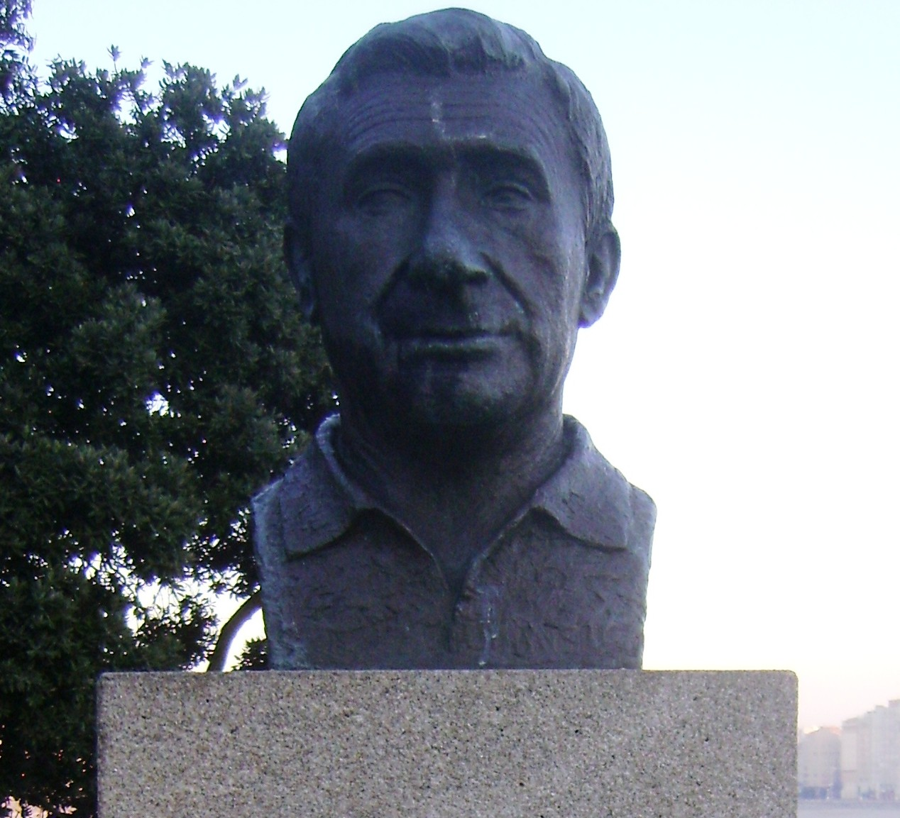 Busto de Arsenio Iglesias en los aldeaños del estadio de Riazor.